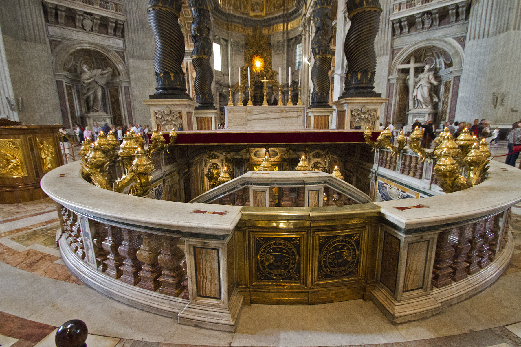 Vatican 5604